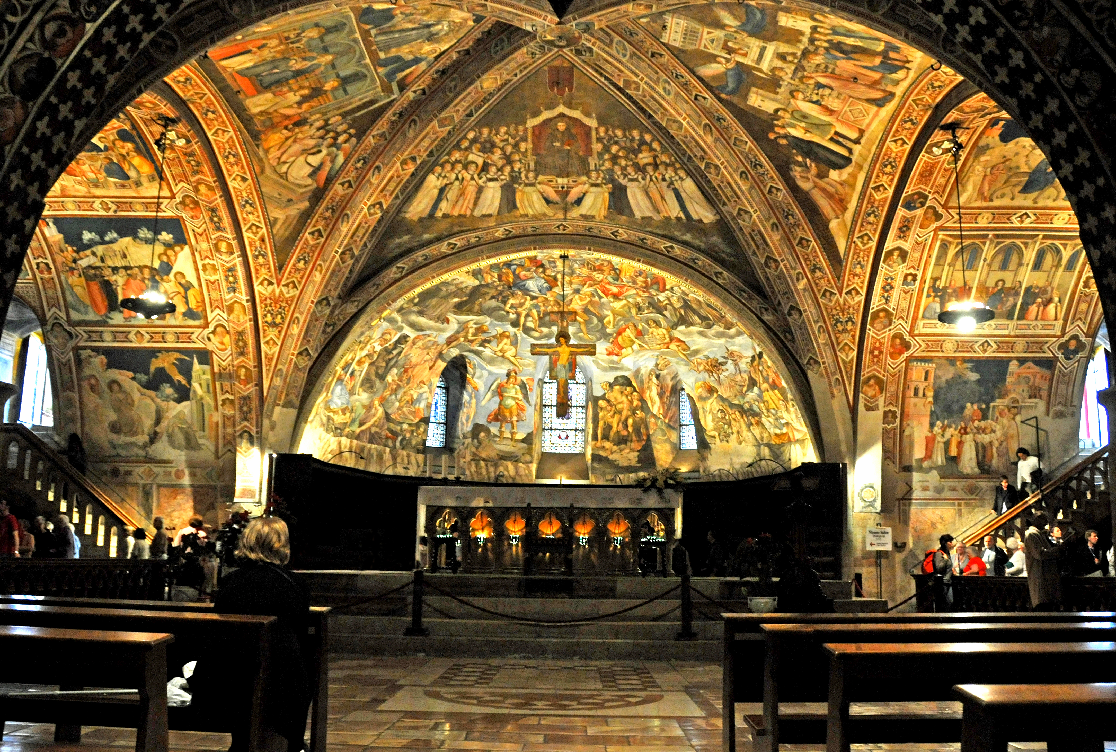 Basílica Inferior de São Francisco de Assis